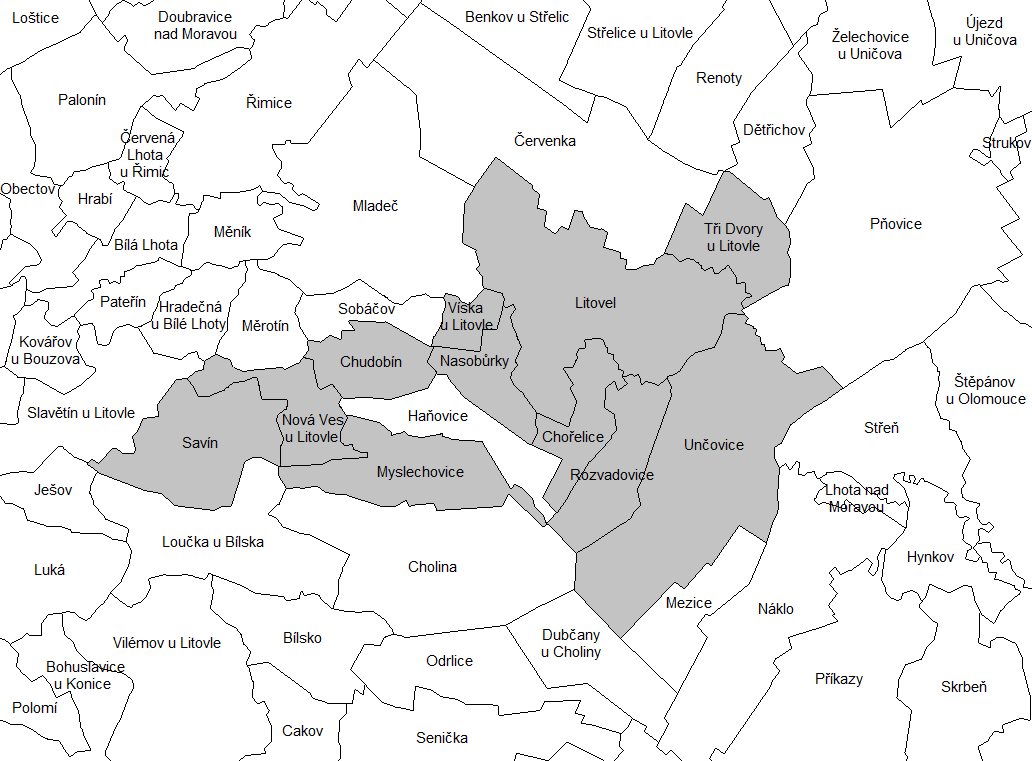 Katastrální mapa Litovle a okolí